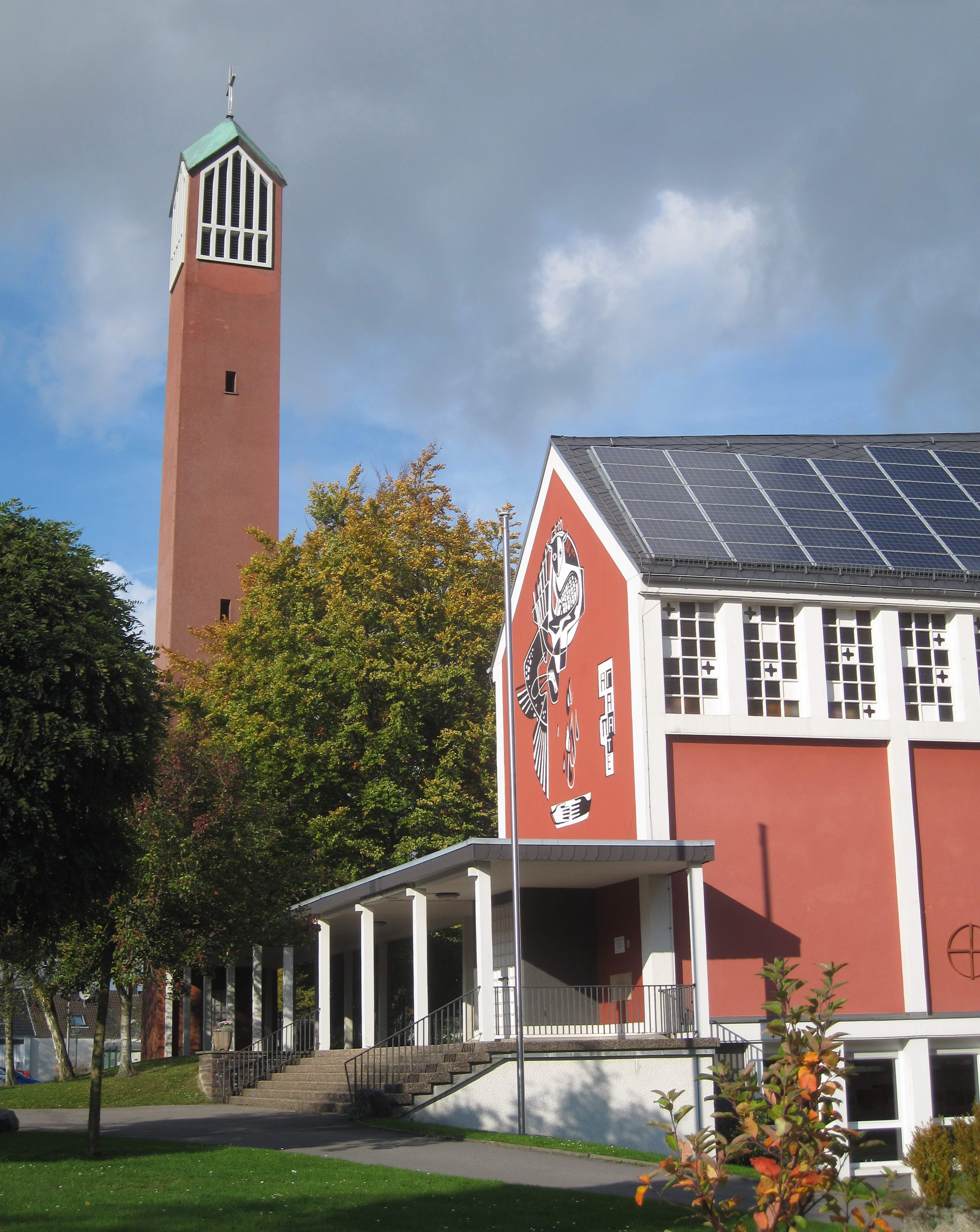 Evangelische Johanneskirche in Iserlohn-Nußberg, Berliner Platz 10. This image shows a heritage building in Germany, located in the North Rhine-Westphalian city Iserlohn (no. 246).